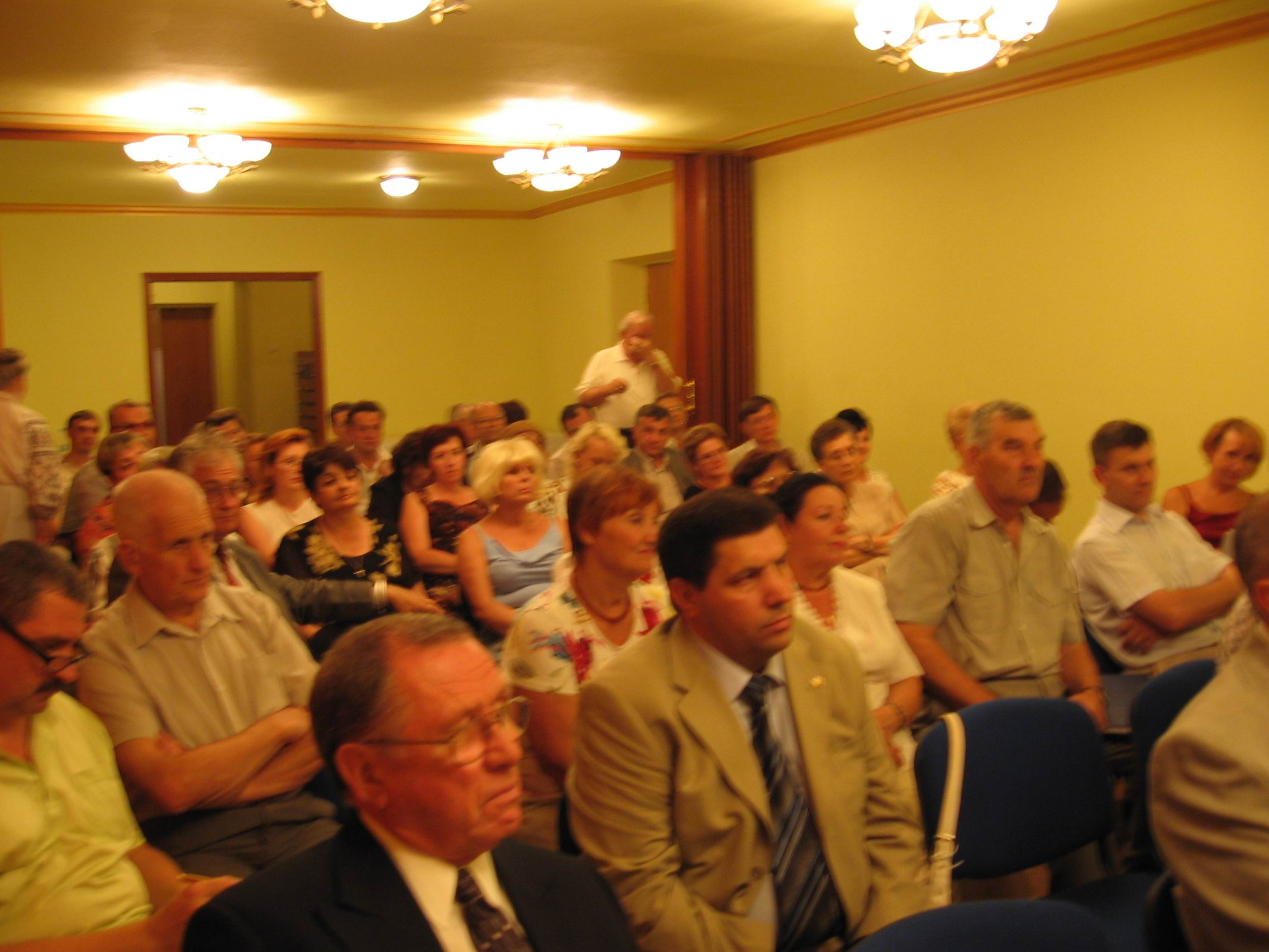 Фото